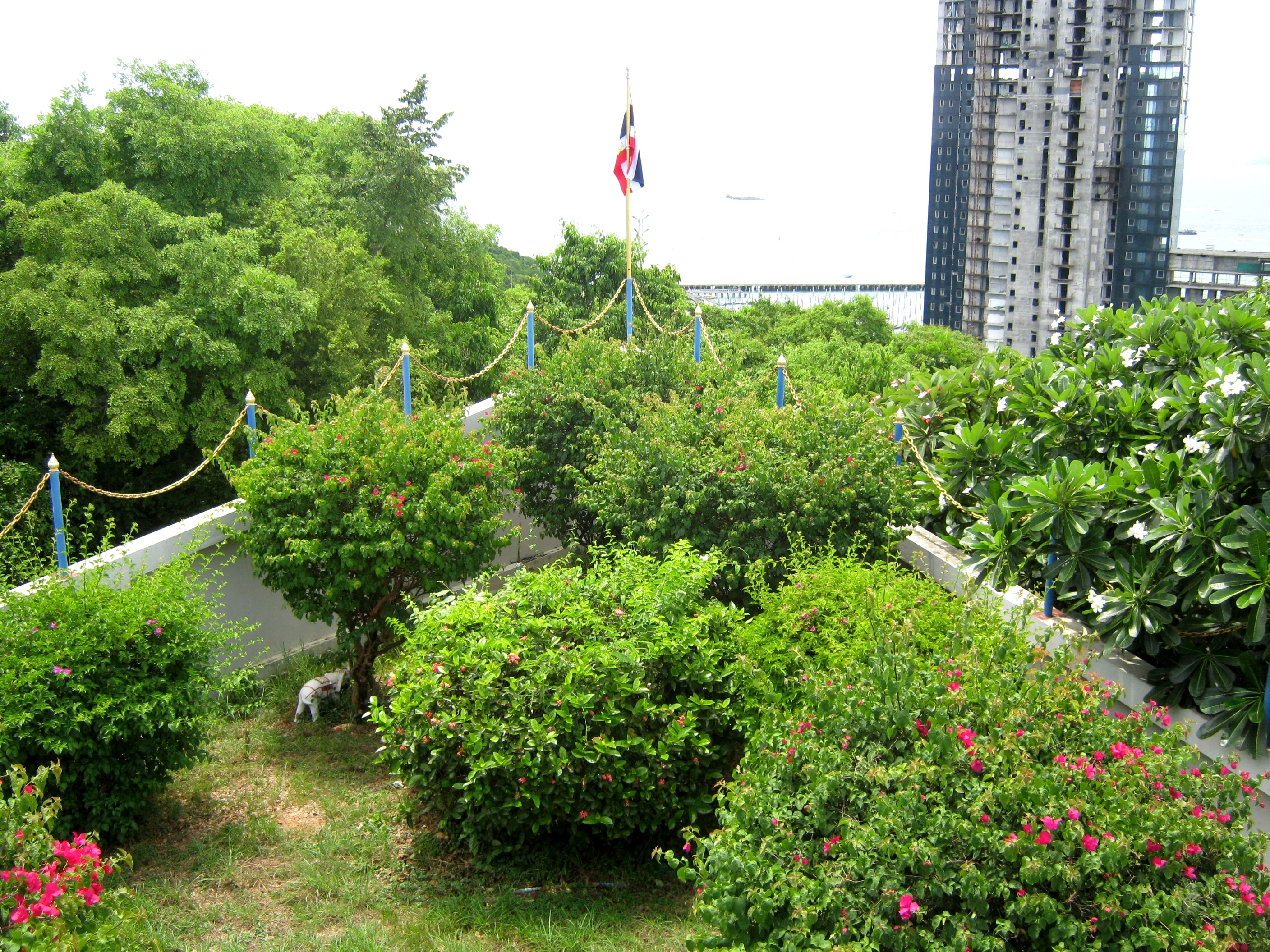 Импровизированный нос корабля на смотровой площадке холма Пратамнак